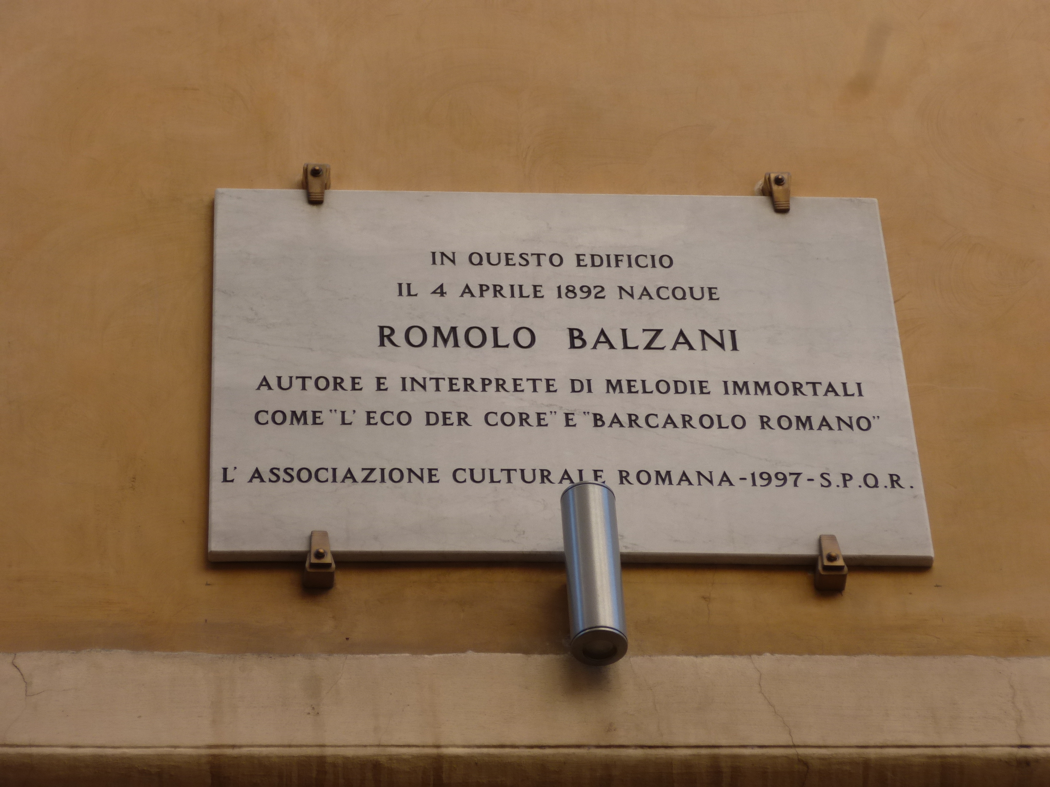 Roma, memoria di Romolo Balzani a vicolo dei Chiodaroli 8